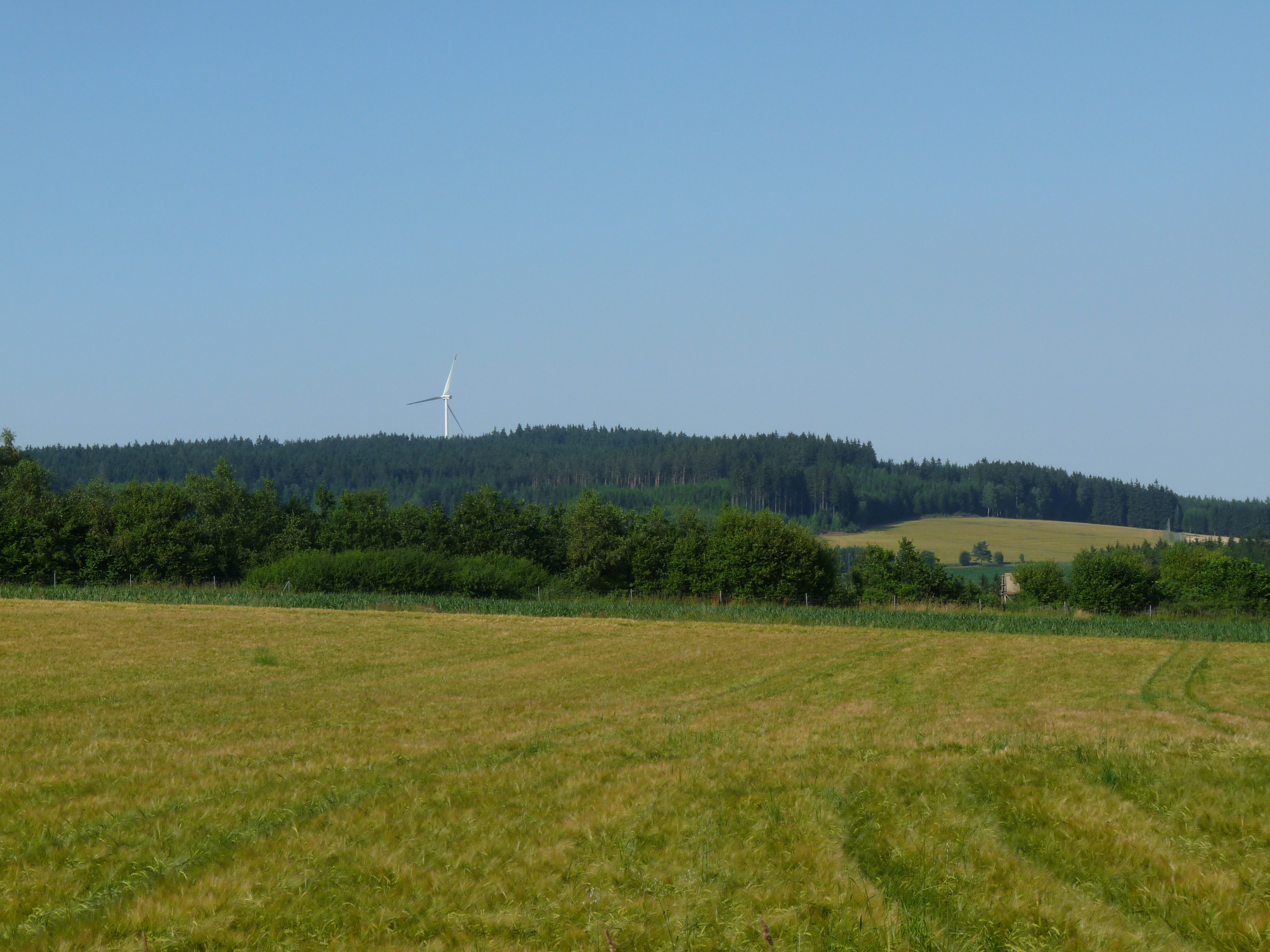 Blick auf den Schilderberg